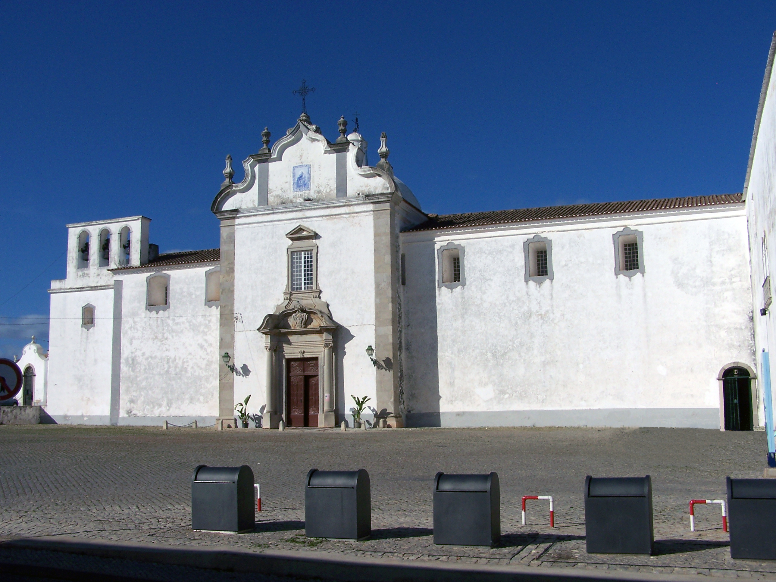 Igreja de Nossa Senhora do Carmo de Tavira.